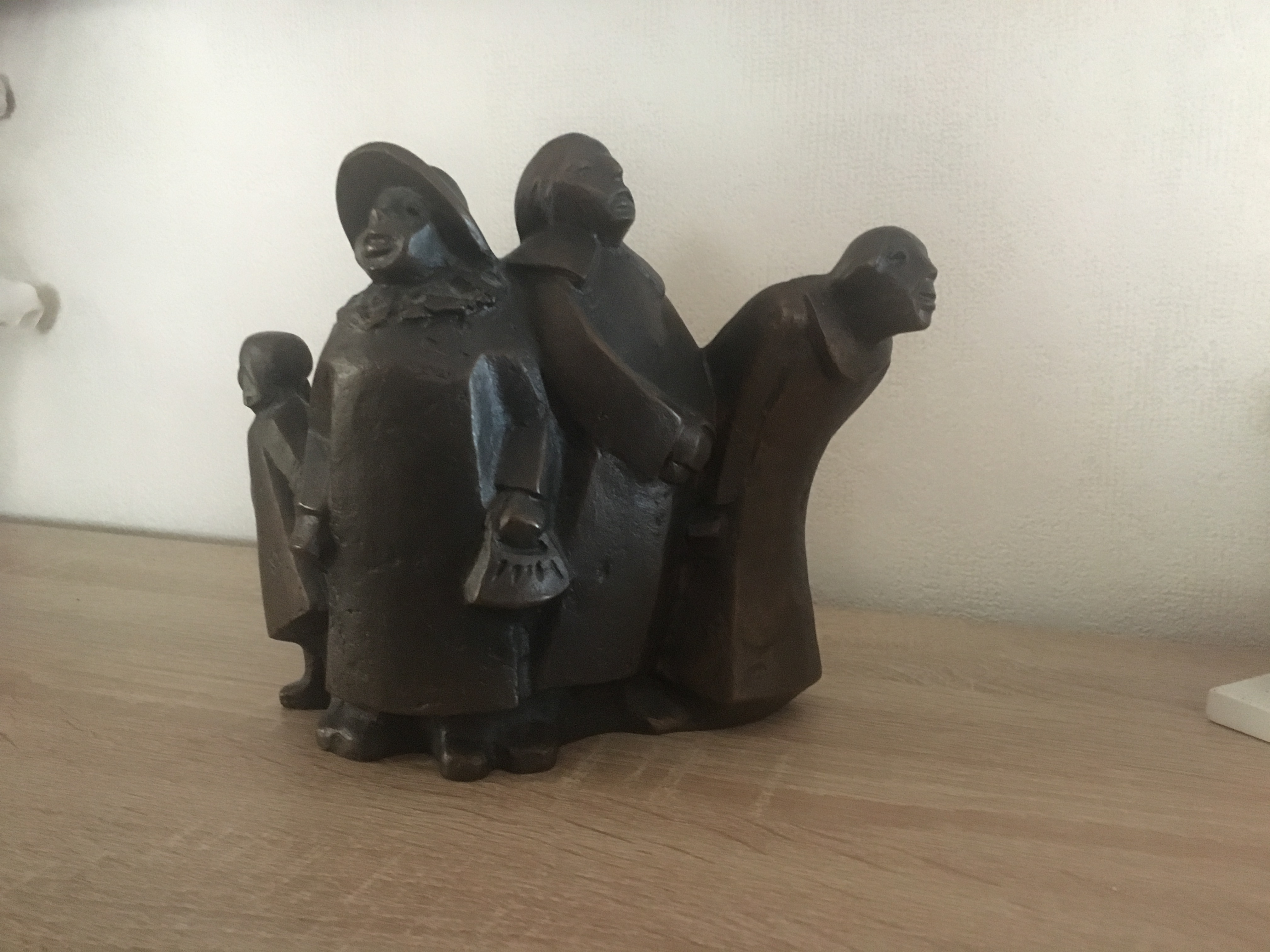 Visiteurs du musée